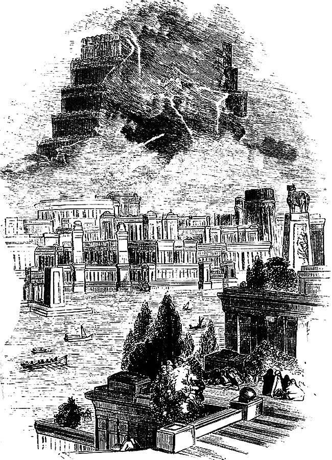 Vue d'artiste de la ville de Babylone